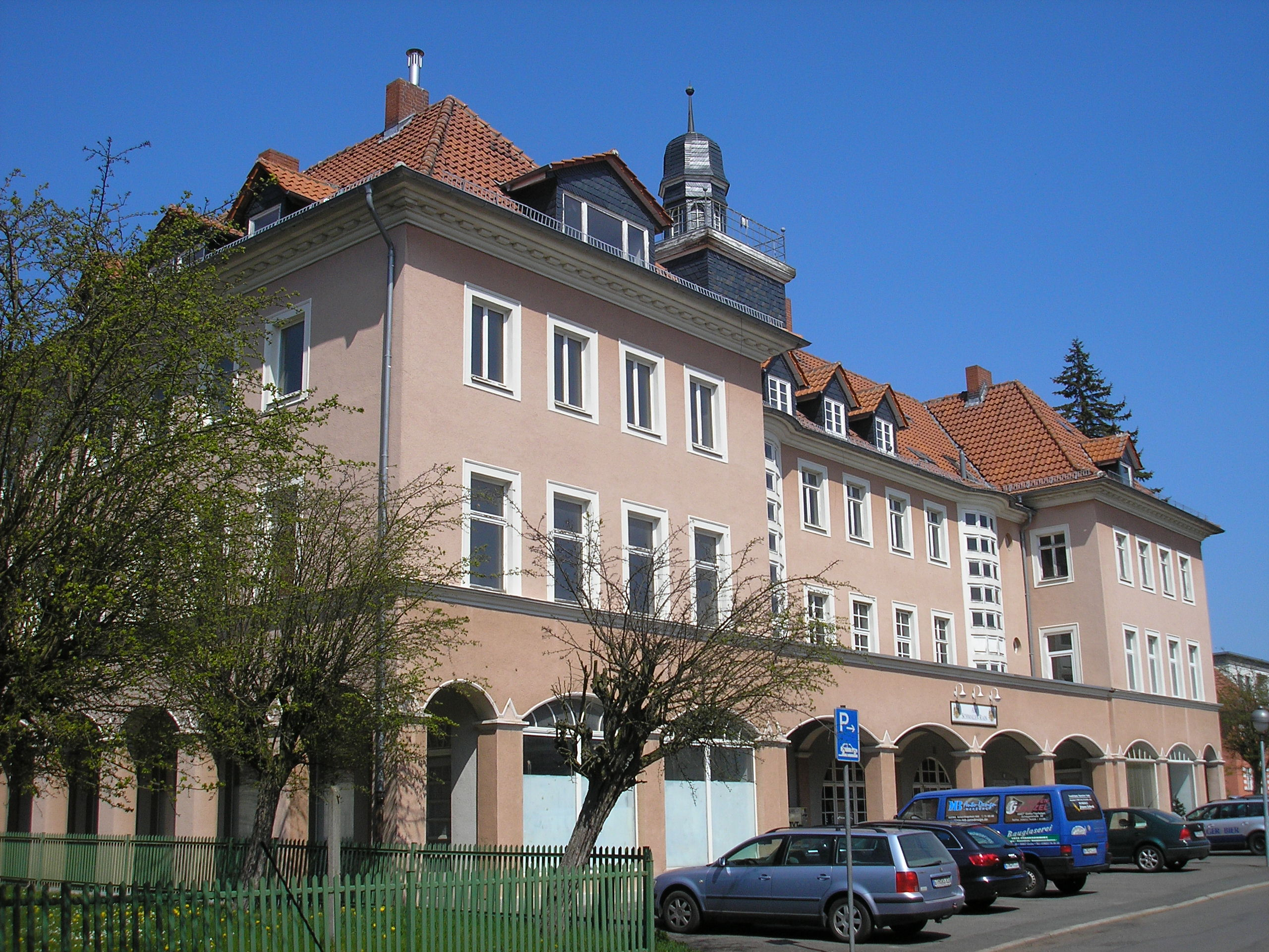 Das Gemeinschaftshaus der Gartenstadt "Am Schmalen Rain" in Gotha (Thüringen).